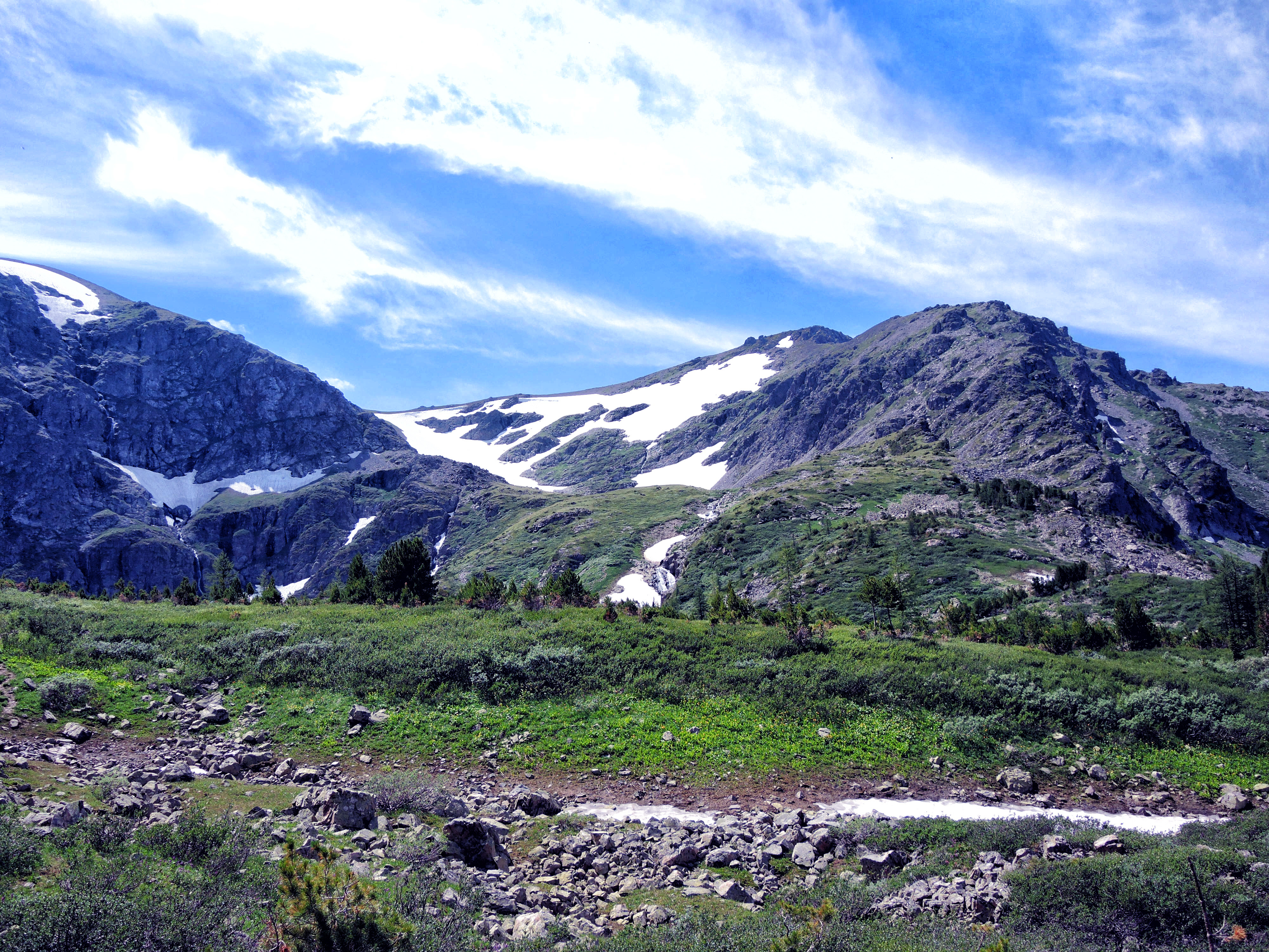 Катунский заповедник: Усть-Коксинский район, Алтай This image is related to the protected area of Russia number 0400042